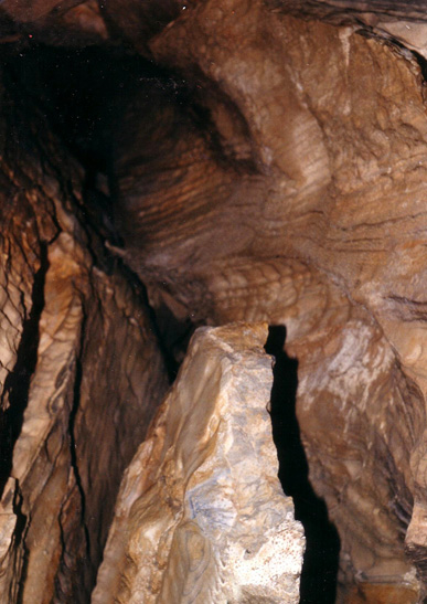 Spannagelhöhle